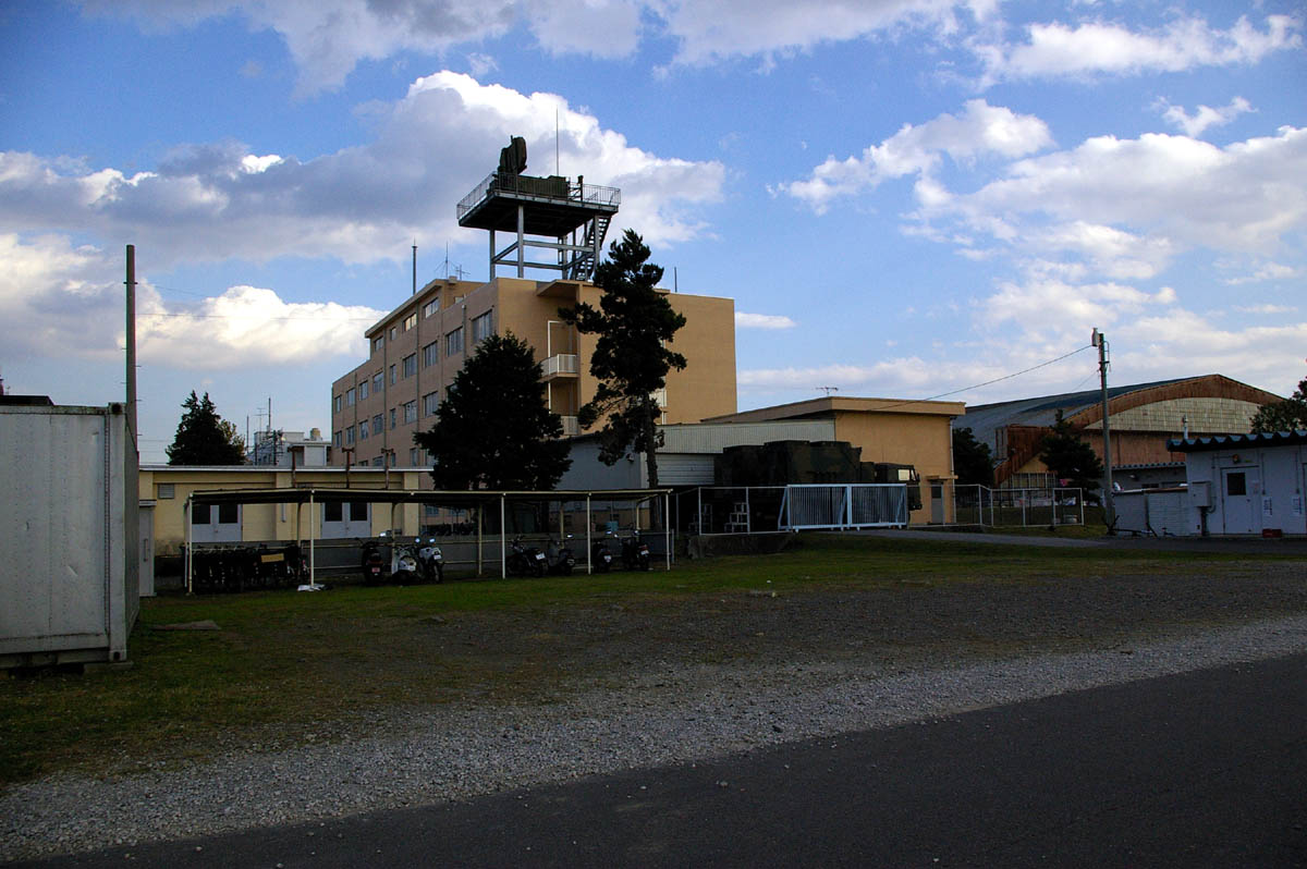 Camp Matsudo,Japan. ja:2007年11月18日、松戸駐屯地。